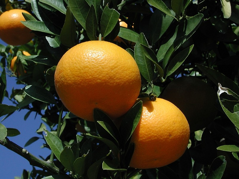 イヨカン 撮影場所：広見町 撮影日：２００１年１１月２３日